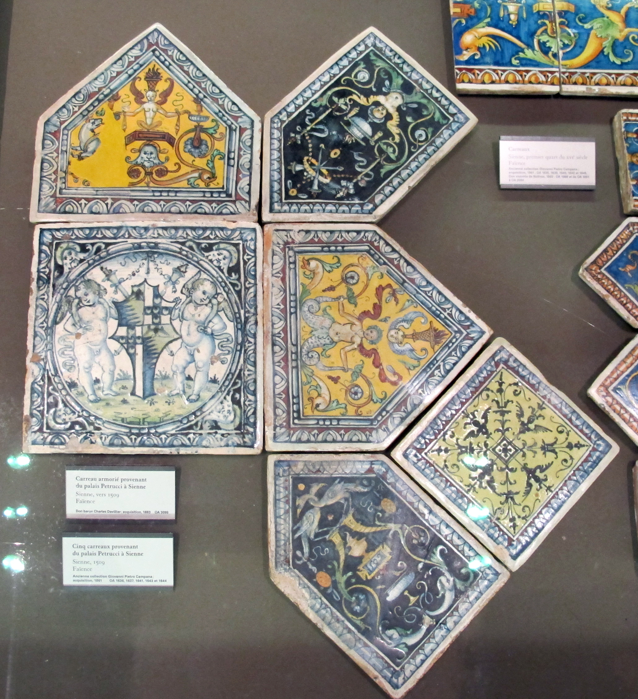 Maiolica del Louvre